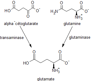 synthèse du glutamate